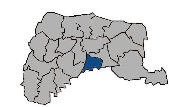 台灣省雲林縣大埤鄉 KaurJmeb於2005年1月28日為編輯zh:大埤鄉所繪製